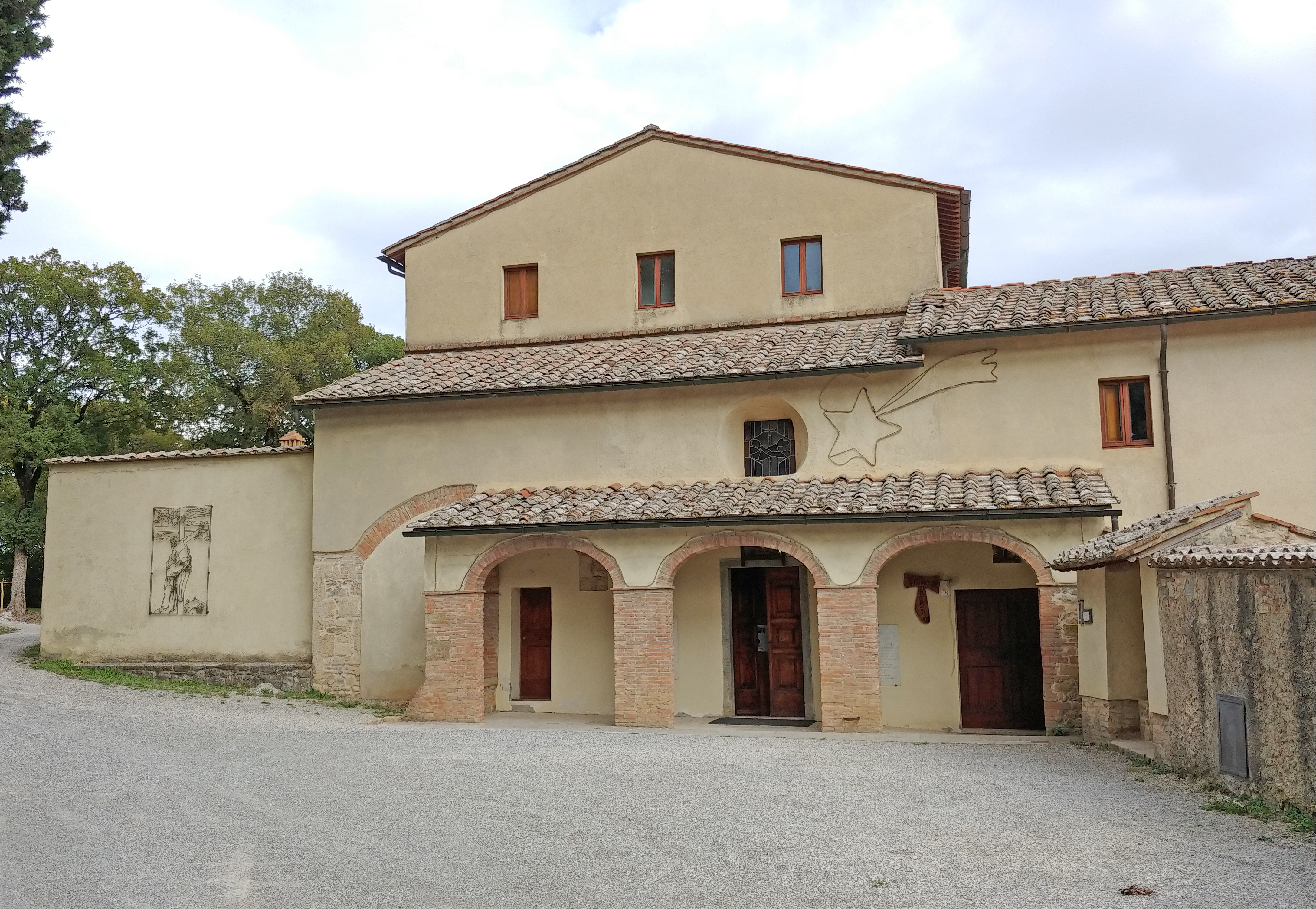 Facciata.